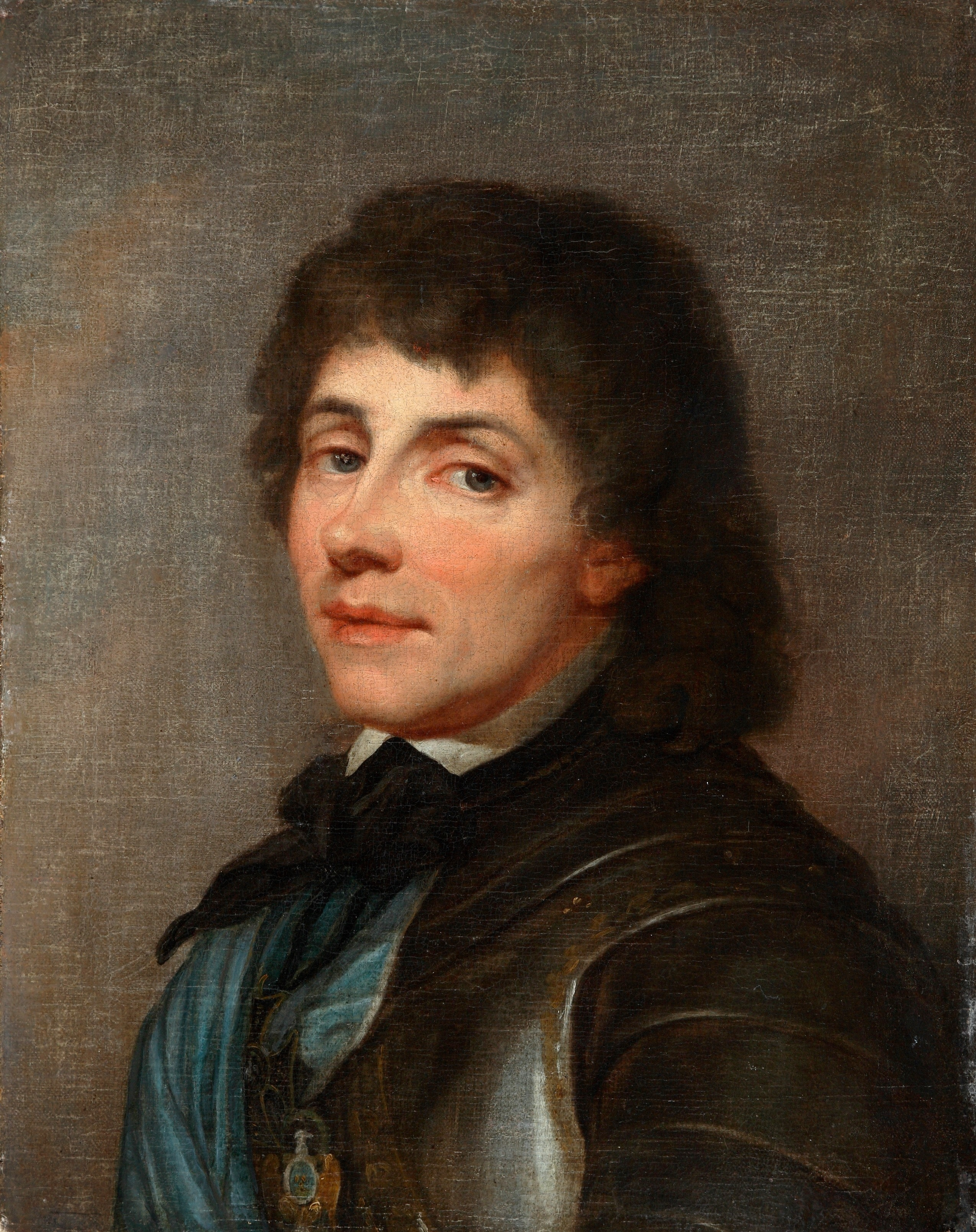 Belarusian (Taraškievica orthography): Партрэт Тадэвуша Касьцюшкі (Tadevuš Kaściuška)